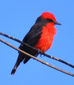 Moucherolle vermillon photographié le 22 mars 2011 au Nord du Chili